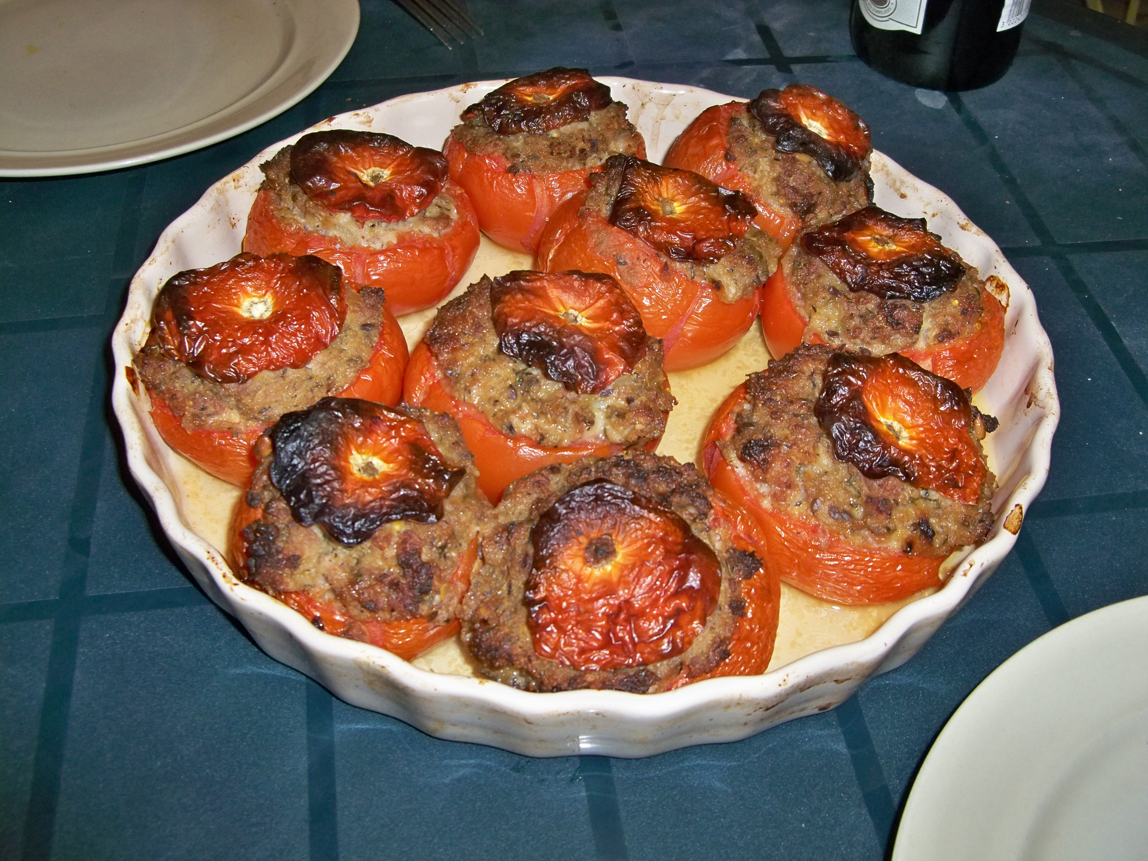 Plat de tomates farcies à la provençale